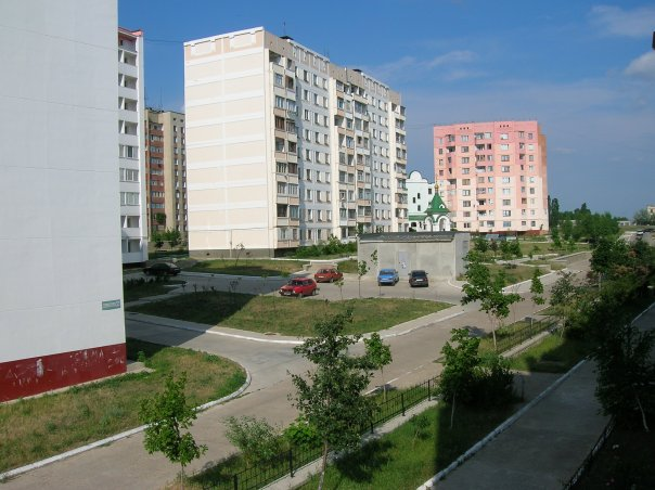 Жилой массив на западной окраине города